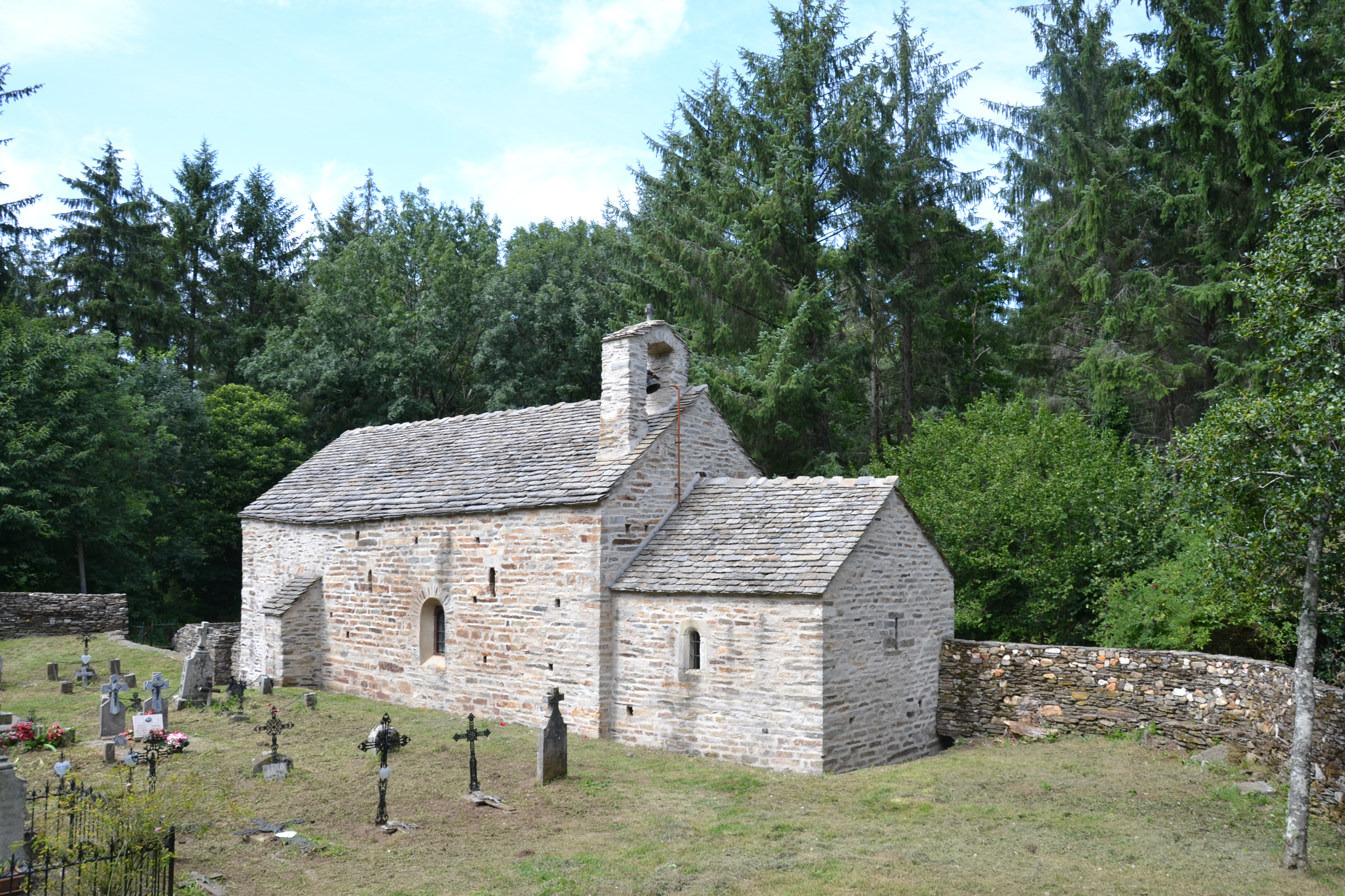 Vue de l'église et de son cimetière